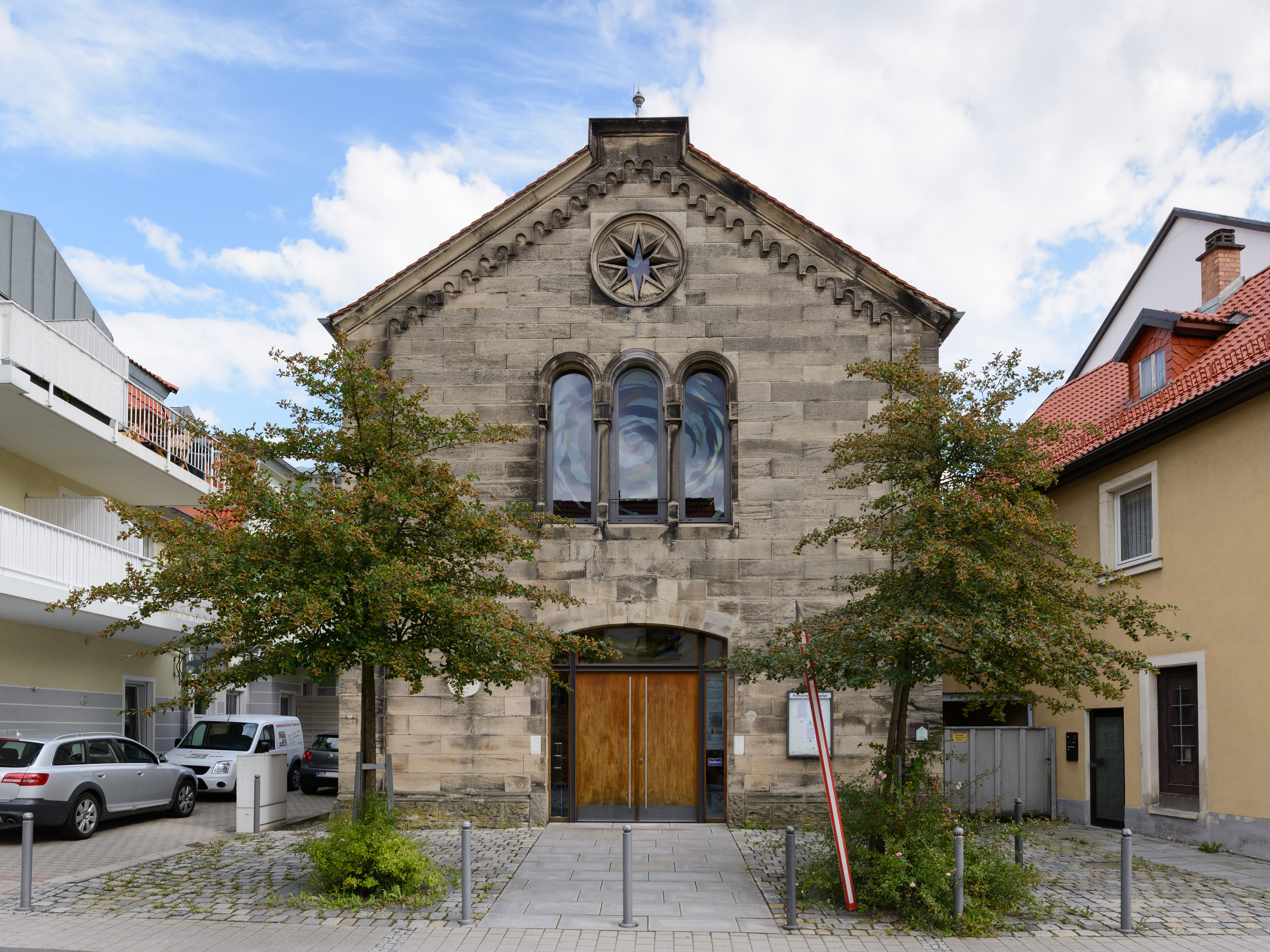 Gebäude Johann-Nikolaus-Zitter-Straße 27 in Kronach, ehemalige Synagoge.